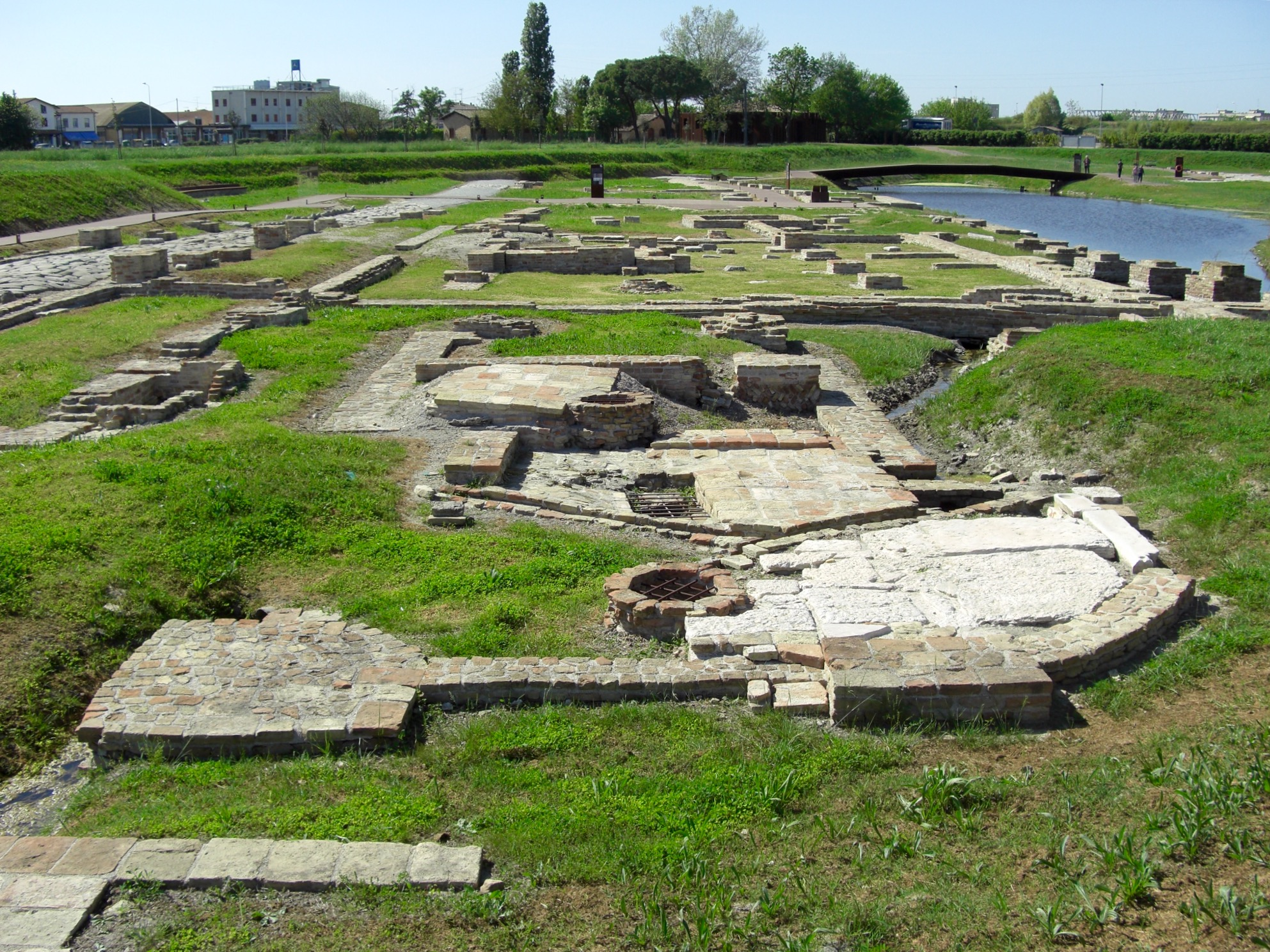 Antico porto di Ravenna This is a photo of a monument which is part of cultural heritage of Italy.